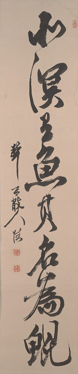 Die ersten zwei Sätze aus dem Zhuangzi vom Kalligraphen Doi Gōga. Gōga drawed the first two sentences from Chinese Taoist thinker Zhuang zi (369–286 B.C.)